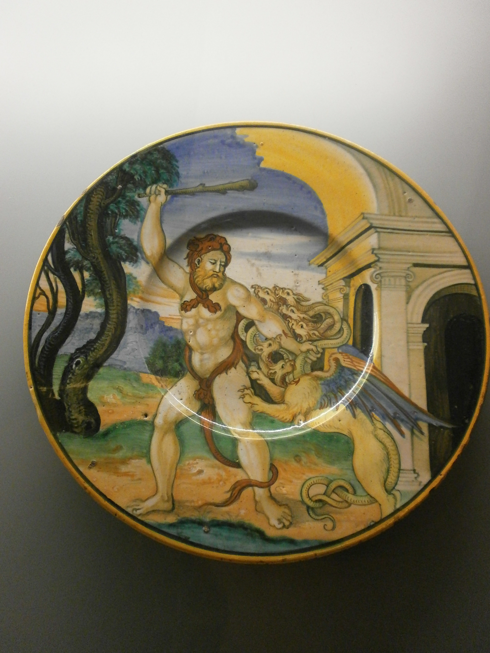 Raccolte d'Arte Apllicata di Milano - Ercole che lotta contro l'idra - Nicola da urbino - maiolica - 1525-35 - Urbino